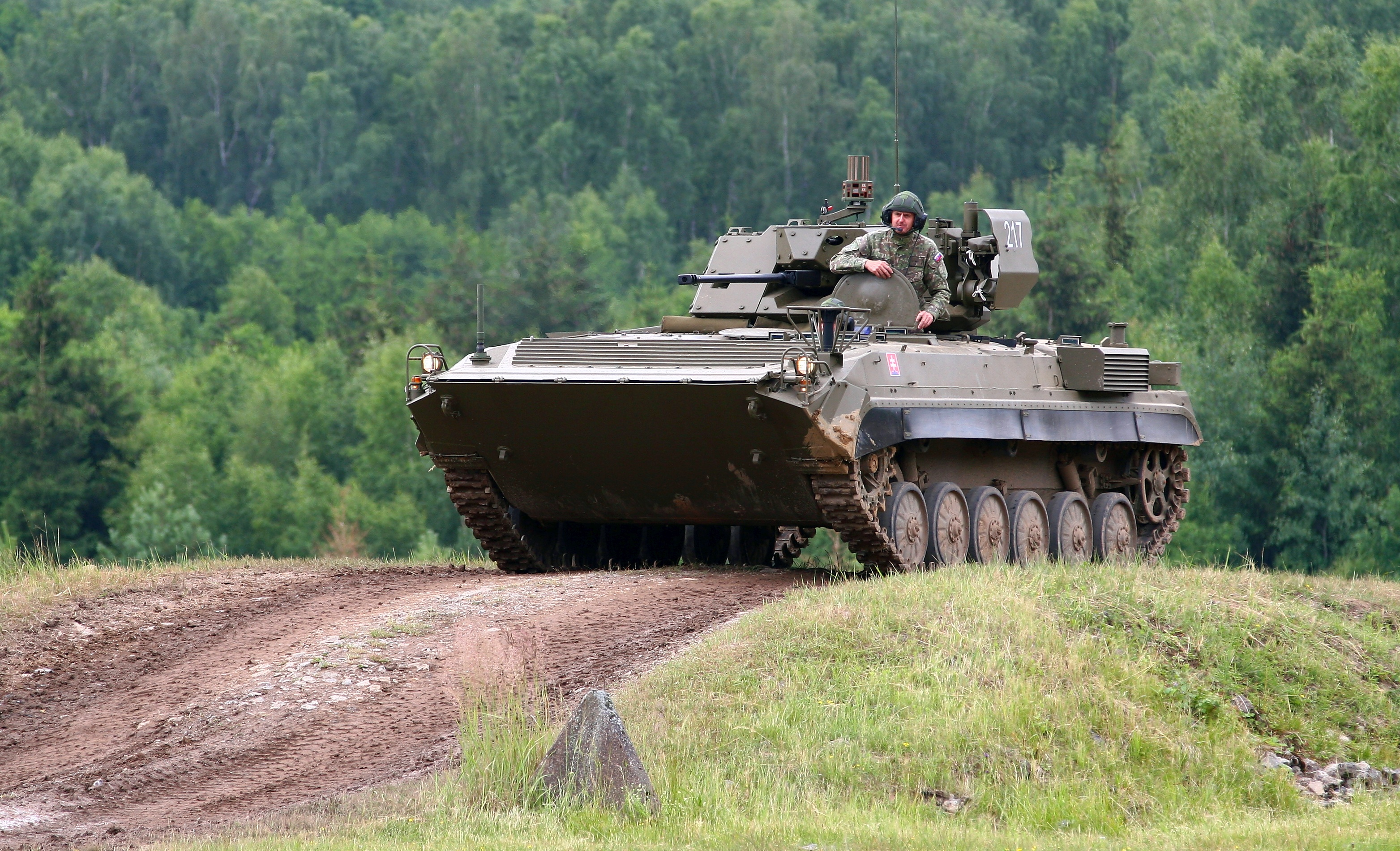 Vojenská technika zaznamenaná při dynamických ukázkách na Dni pozemního vojska BAHNA 2018, který pořádá Velitel společných sil a Nadace pozemního vojska AČR.